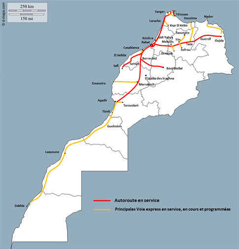 réseau